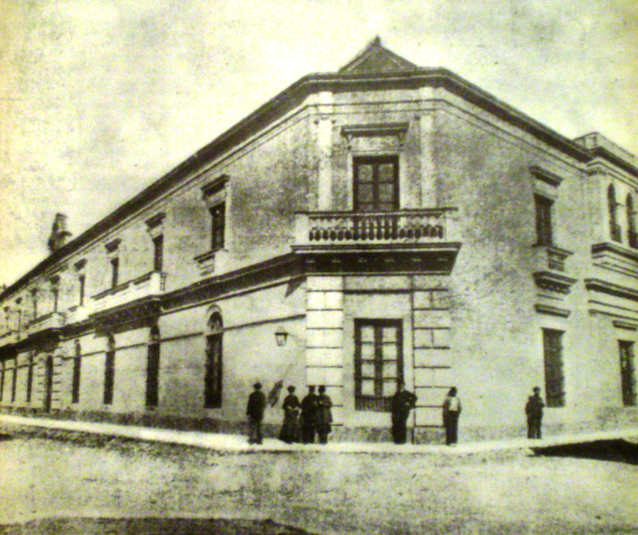 Colegio Nacional de Concepción del Uruguay, Entre Ríos , Argentina